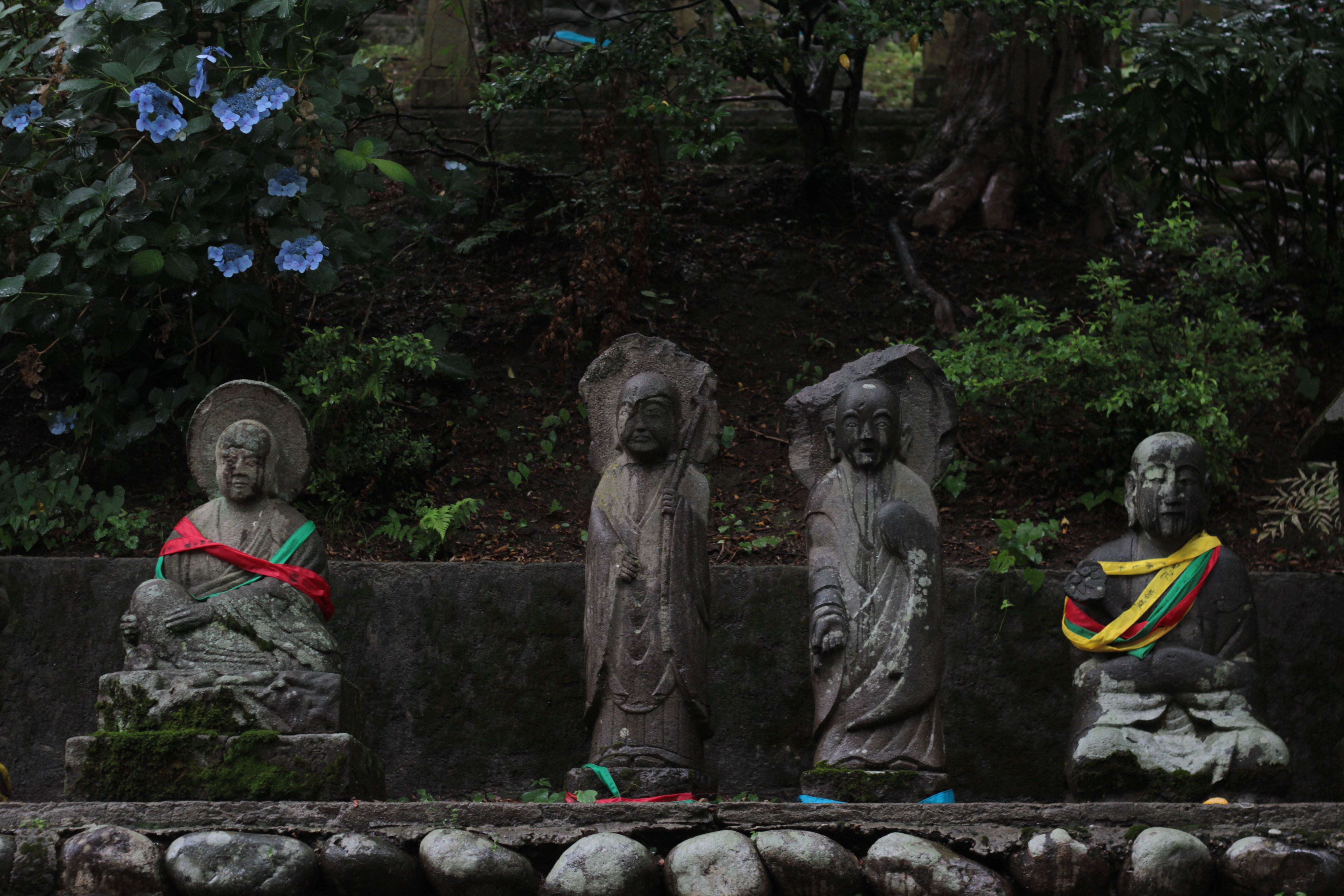 Gohyaku rakan, Toyama (500 arhats).